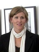 Larissa Boehning auf der Pressekonferenz zur Verleihung des Kulturpreises des Kreises Pinneberg 2008